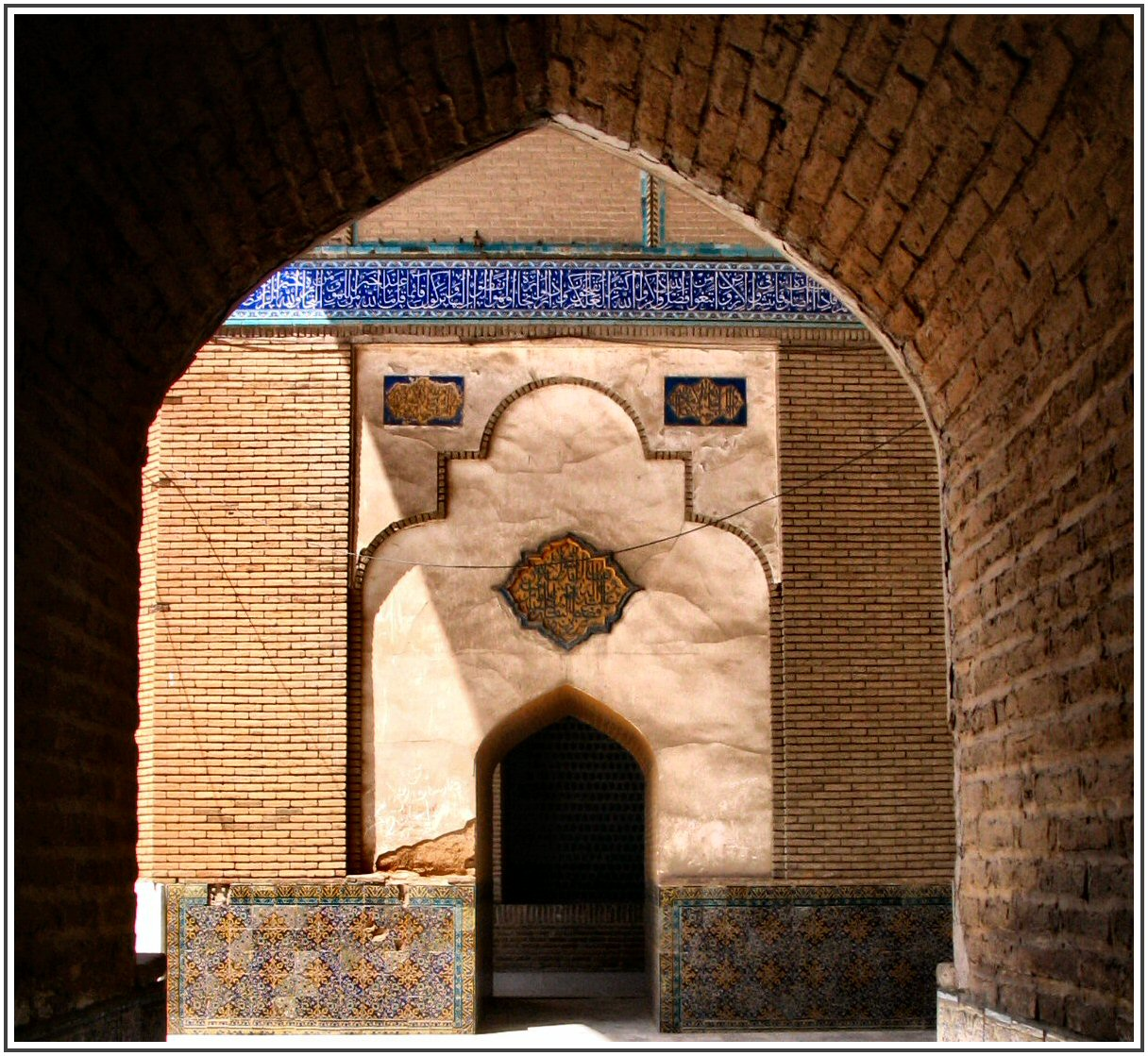 Masjid Sultani in Burujird, Luristan, Iran